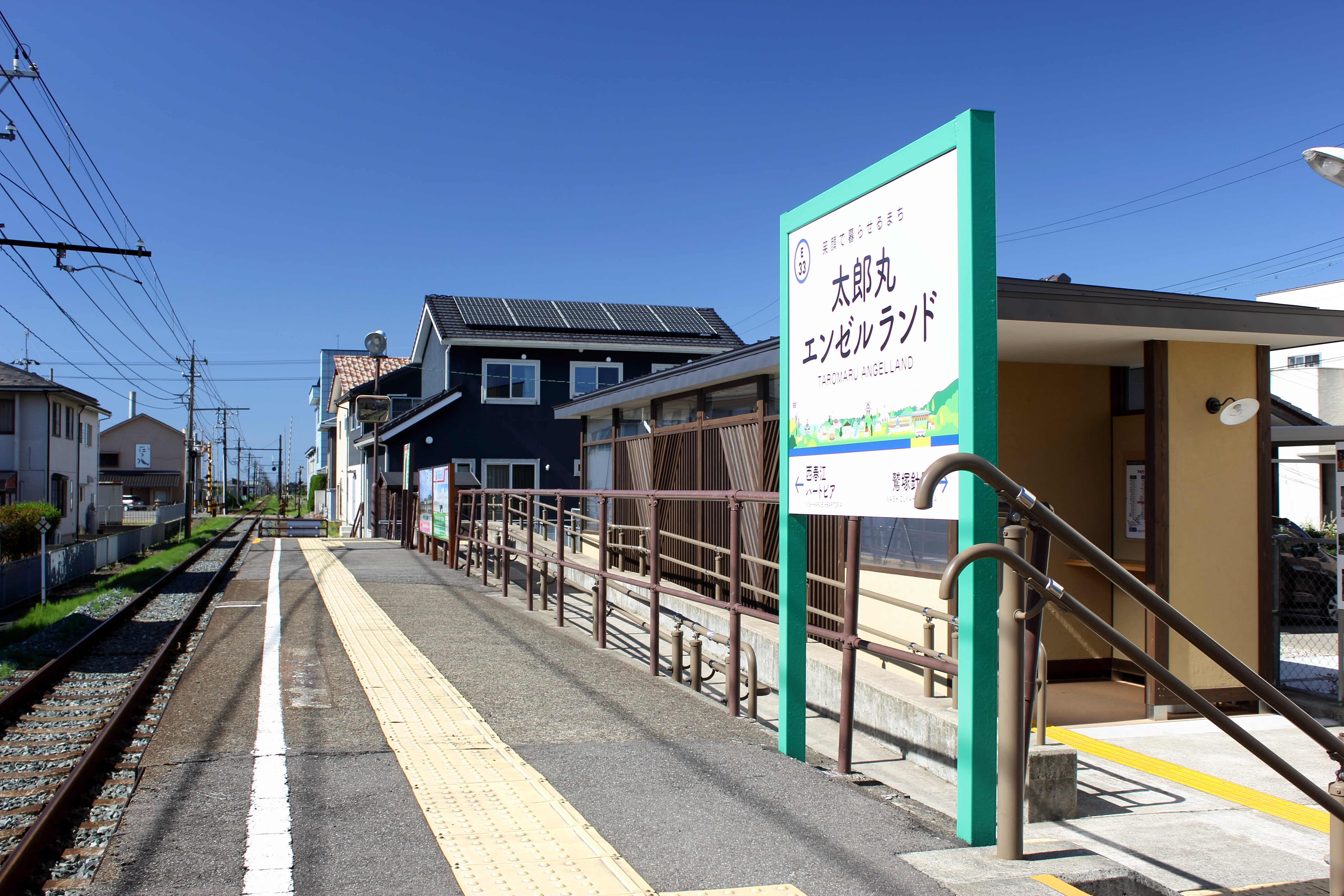 えちぜん鉄道 太郎丸エンゼルランド駅